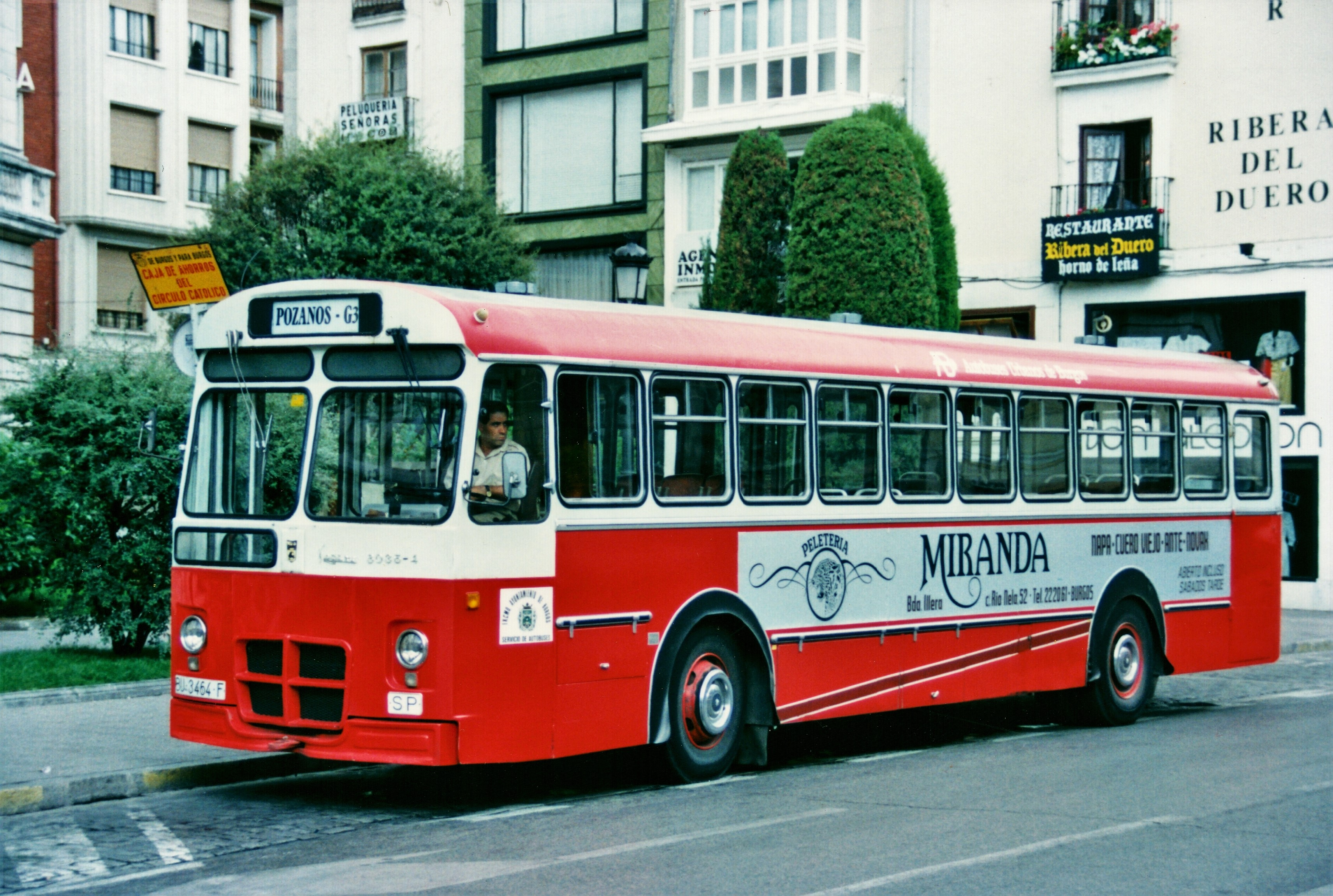 Representante de la gran familia de autobuses del modelo Pegaso 6035, fabricado por ENASA, el 54 de Autobuses Urbanos de Burgos fue puesto en servicio el 9 de mayo de 1980, y dado de baja el 10 de diciembre de 1998.